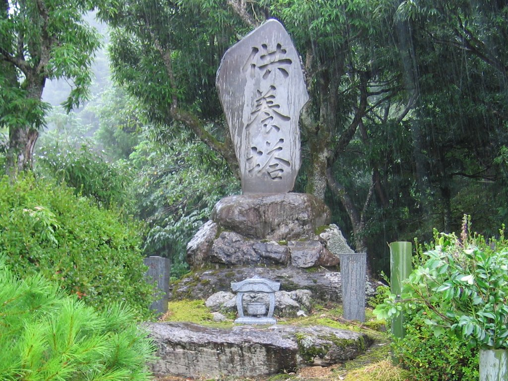 荒金供養塔。1943年の鳥取大震災に伴う鉱泥の決壊で命を落とした作業員とその家族の供養塔。